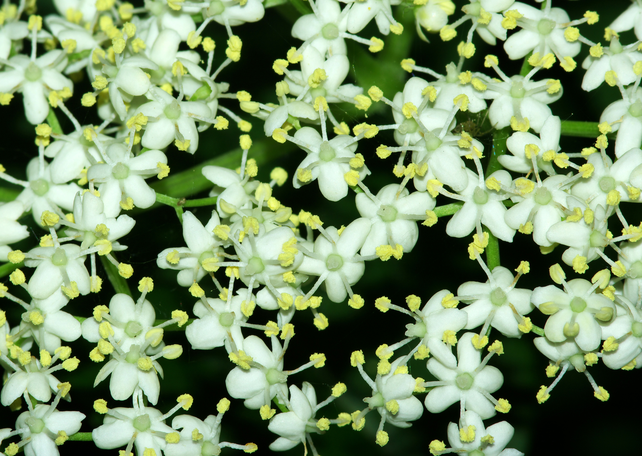 Bez czarny, dziki bez czarny (Sambucus nigra) - kwiaty